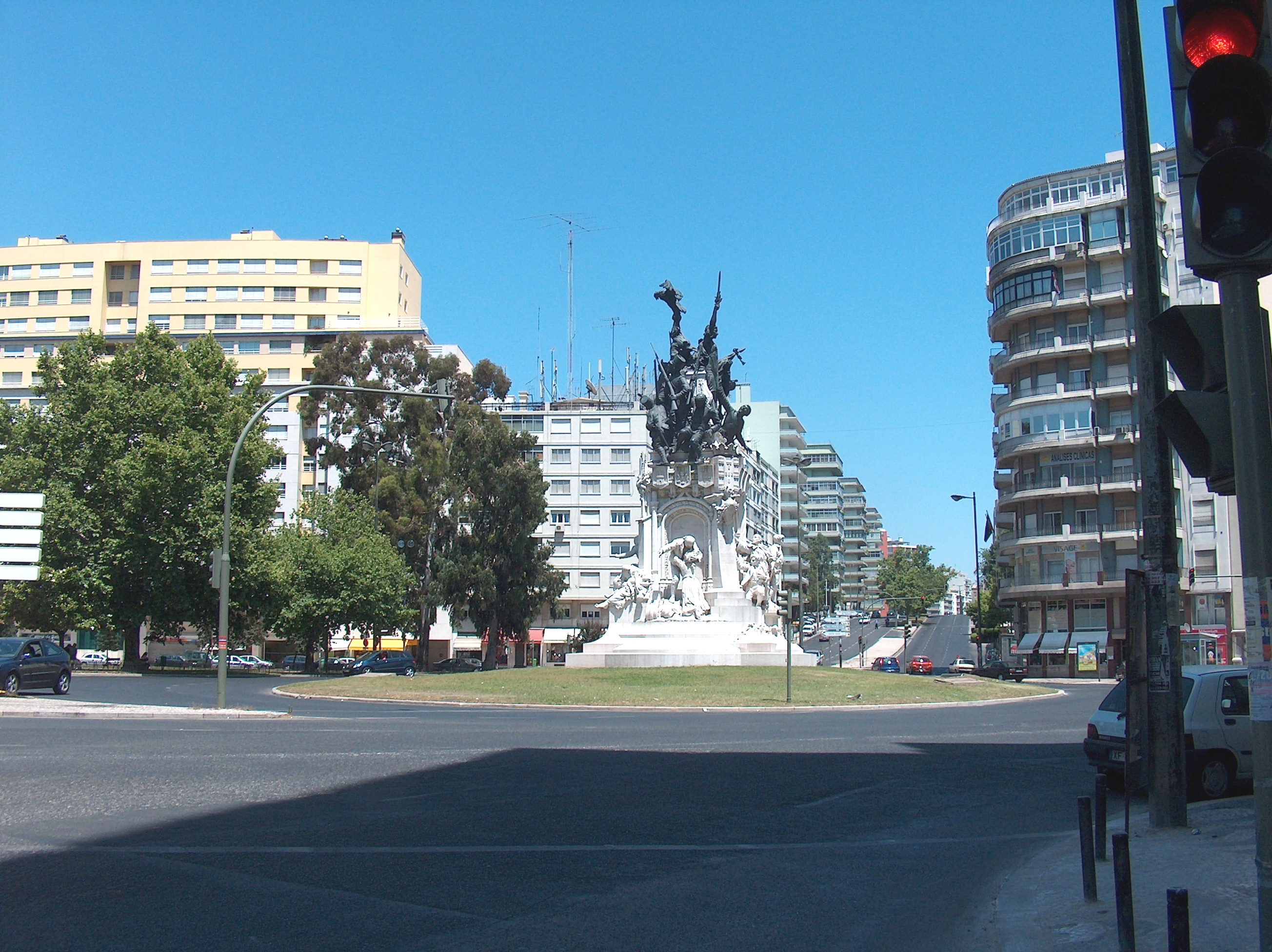 Monumento aos Heróis da Guerra Peninsular (Lisboa). Monumento aos Heróis da Guerra Peninsular, na Praça de Entrecampos em Lisboa, Portugal